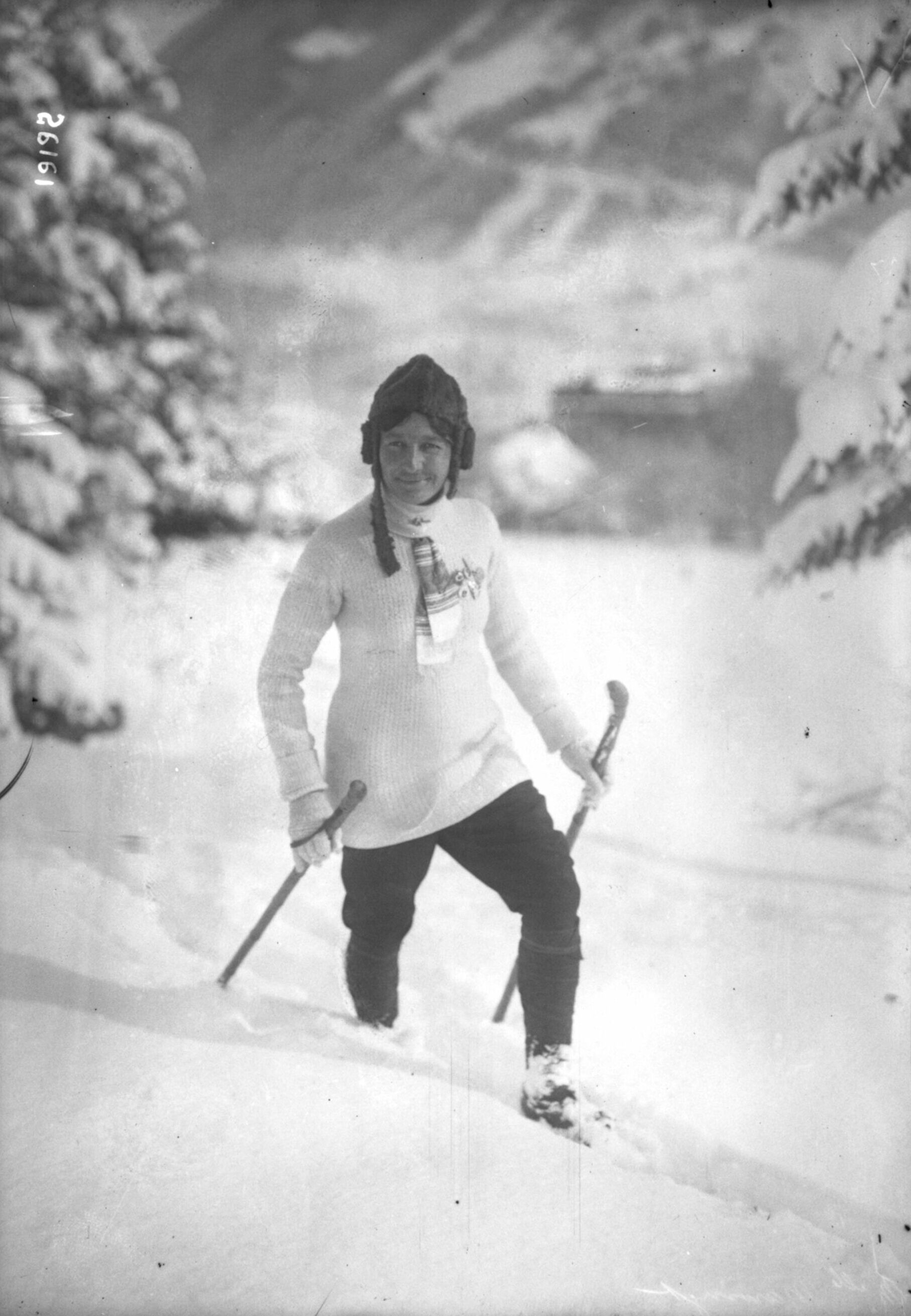 Mlle Marvingt [portrait de la skieuse, Chamonix, 19-1-13] : [photographie de presse] / [Agence Rol]